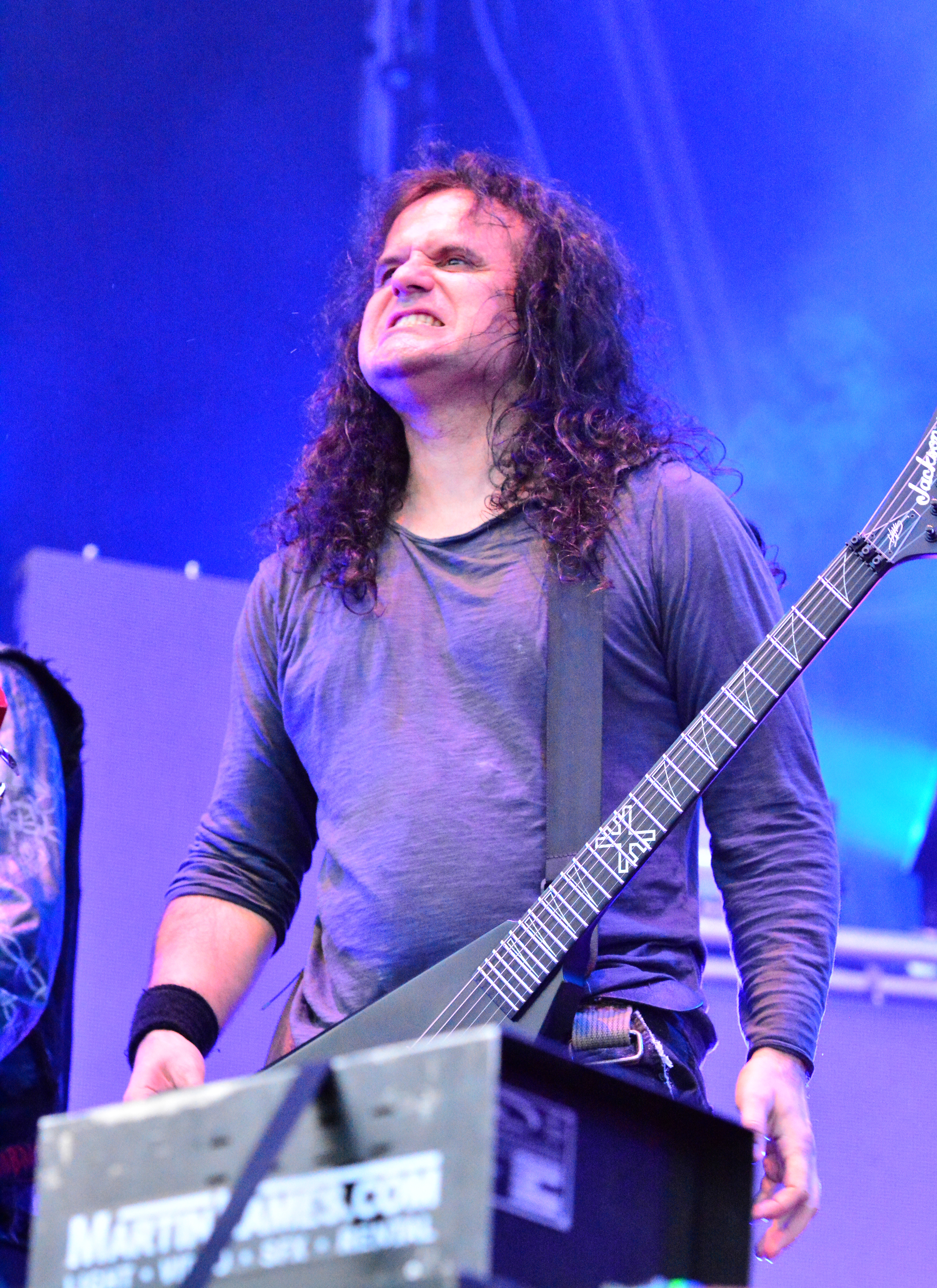 Kreator beim Elbriot 2015